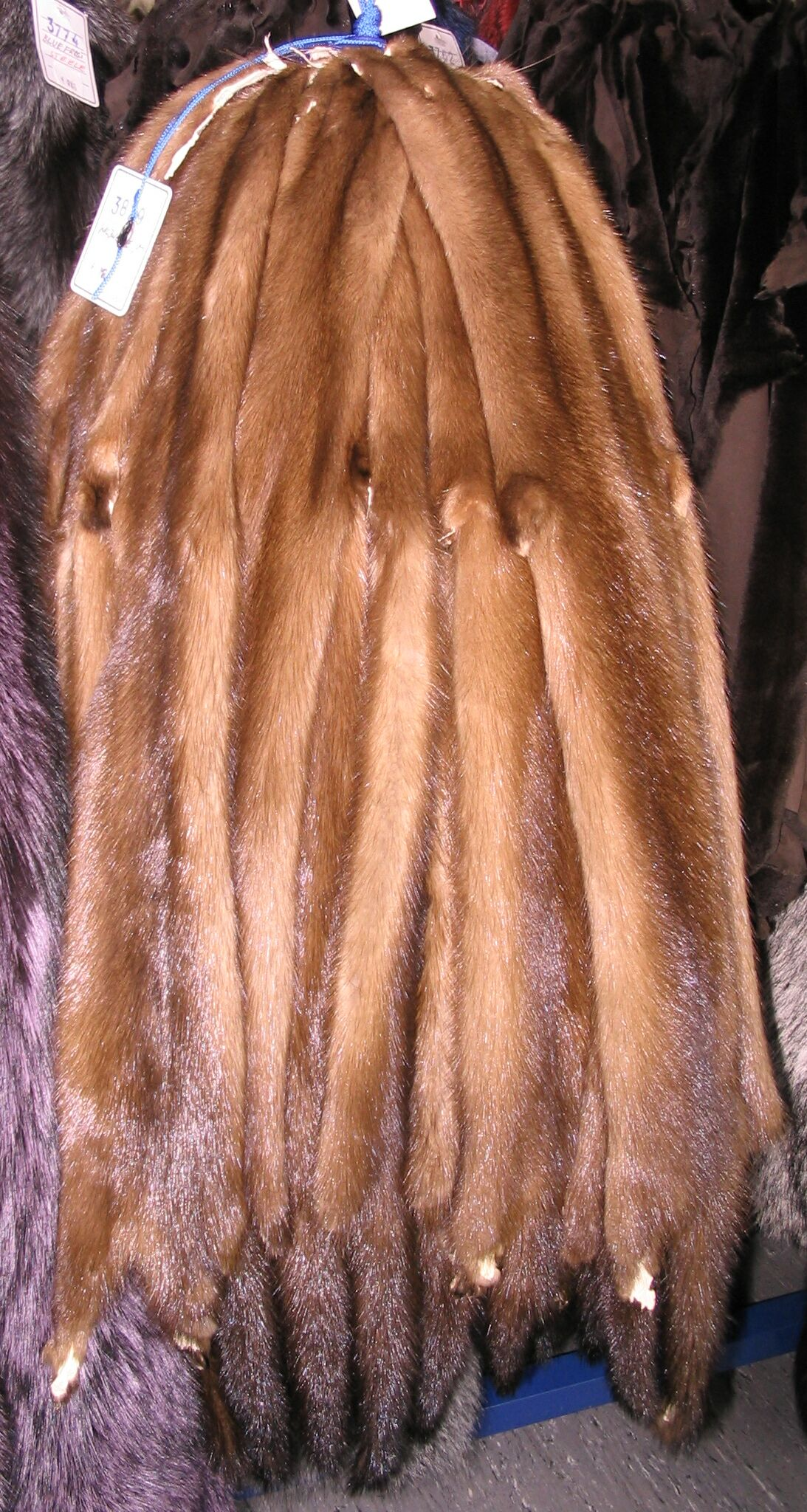 American wild mink skins. Amerikanische Wildnerze.